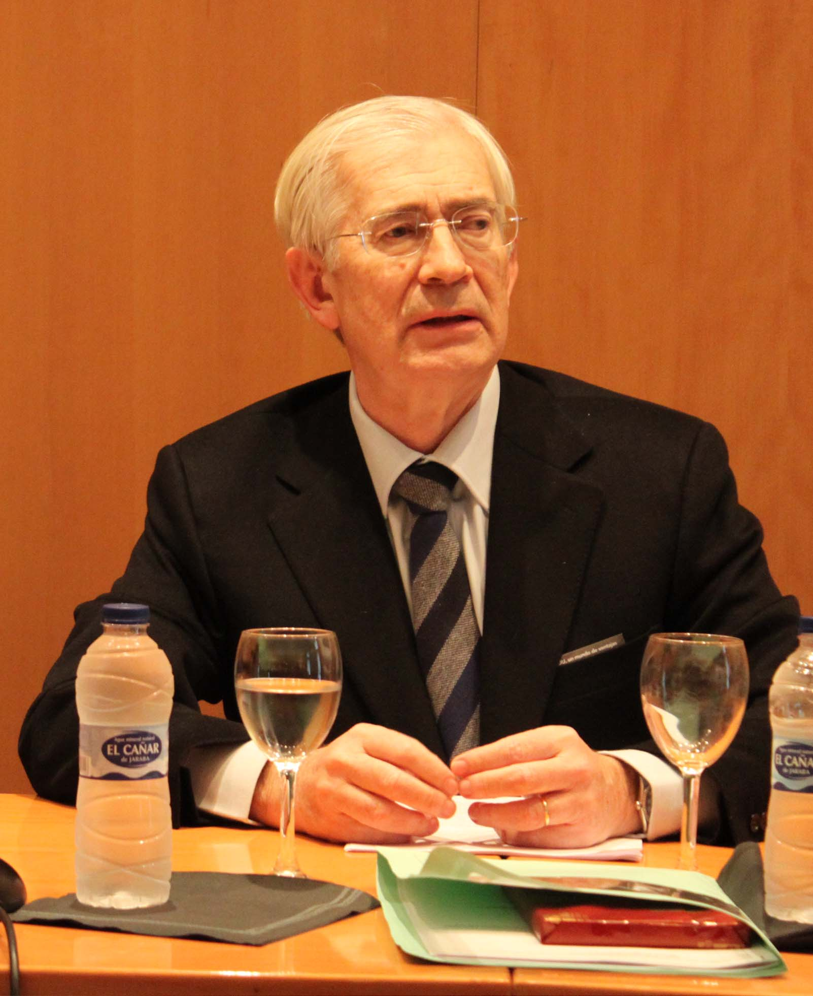 Óscar Alzaga, en 2012.